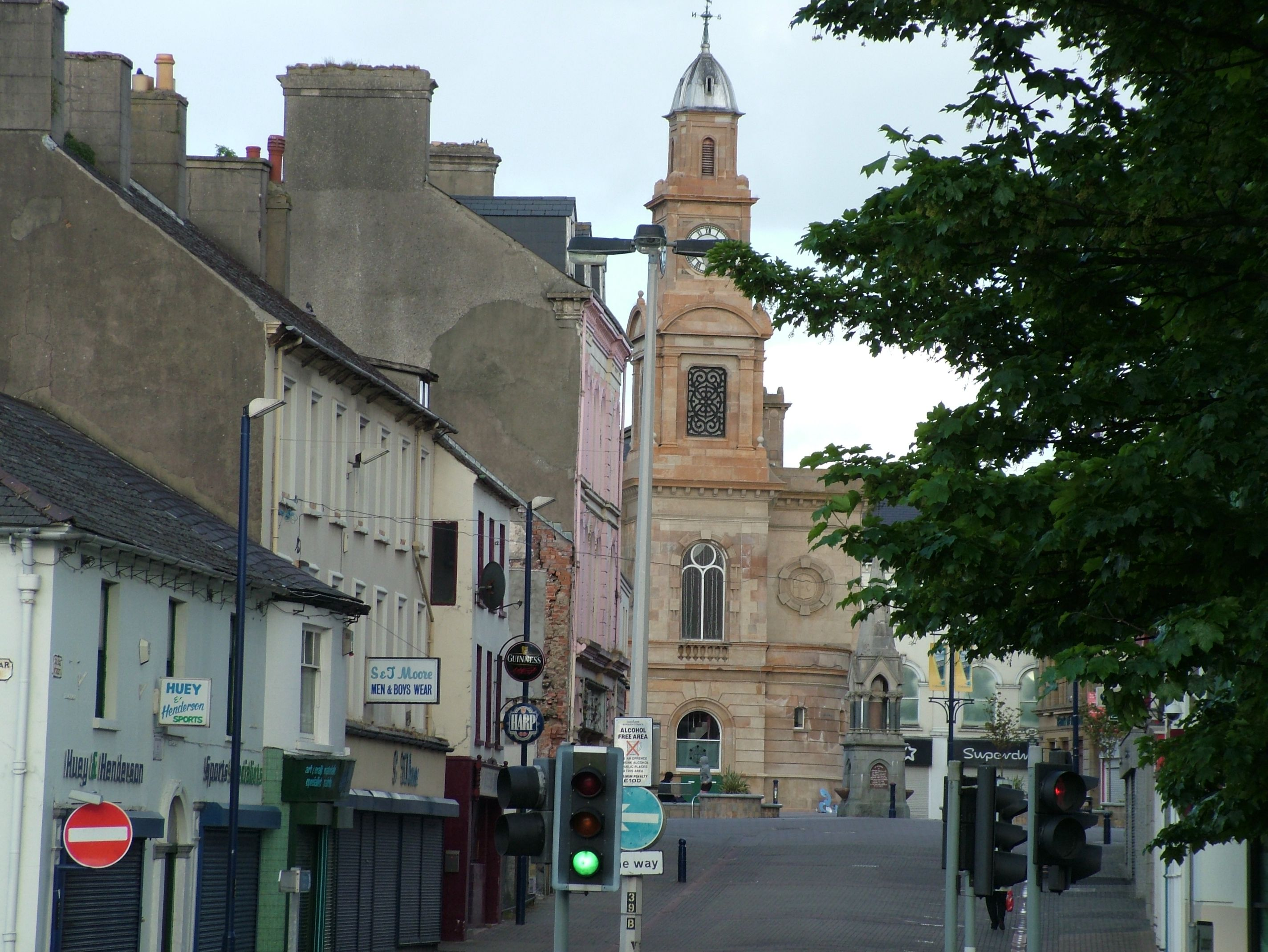 Coleraine, die Fußgängerzone